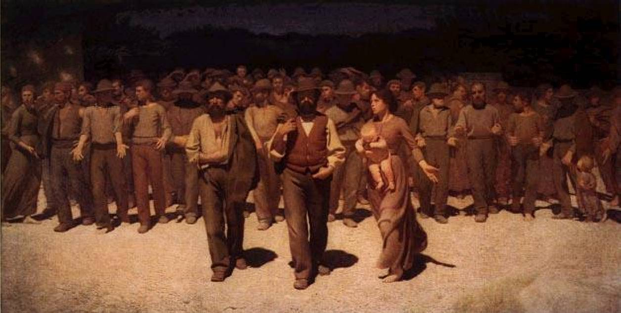 Embarque de imigrantes alemães com destino ao Brasil no século XIX.